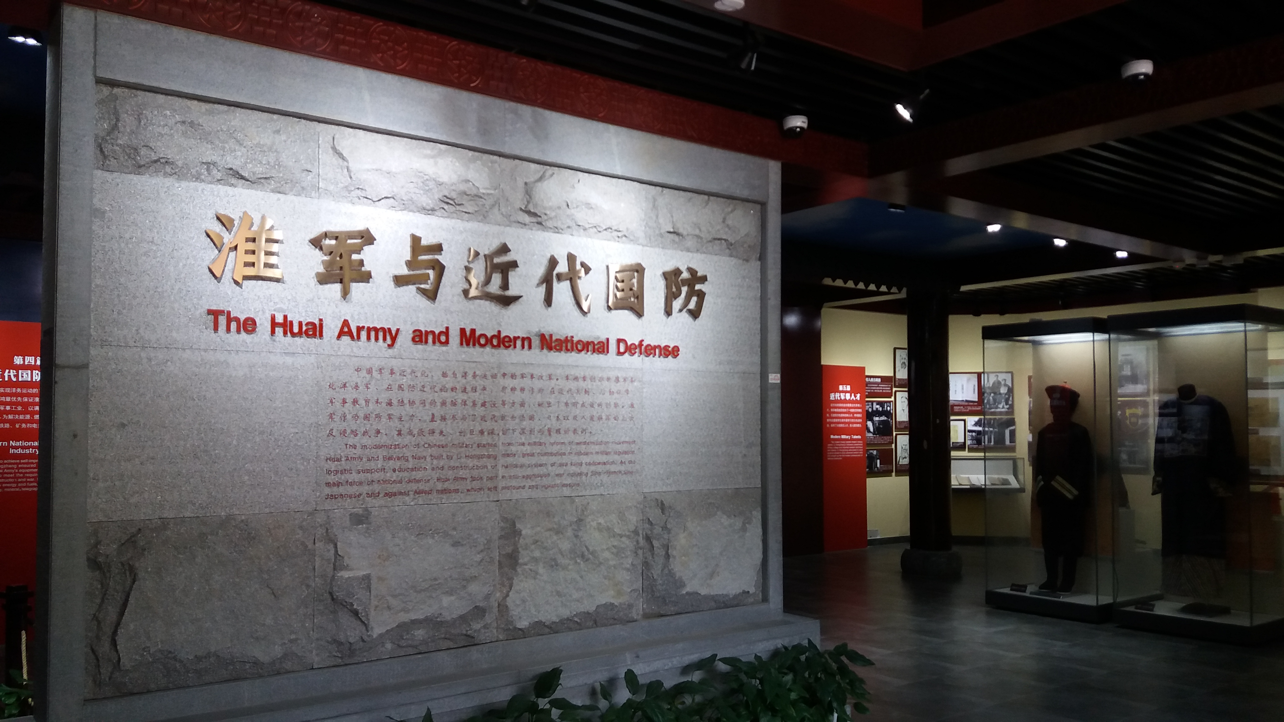 Former Residence of Li Hongzhang